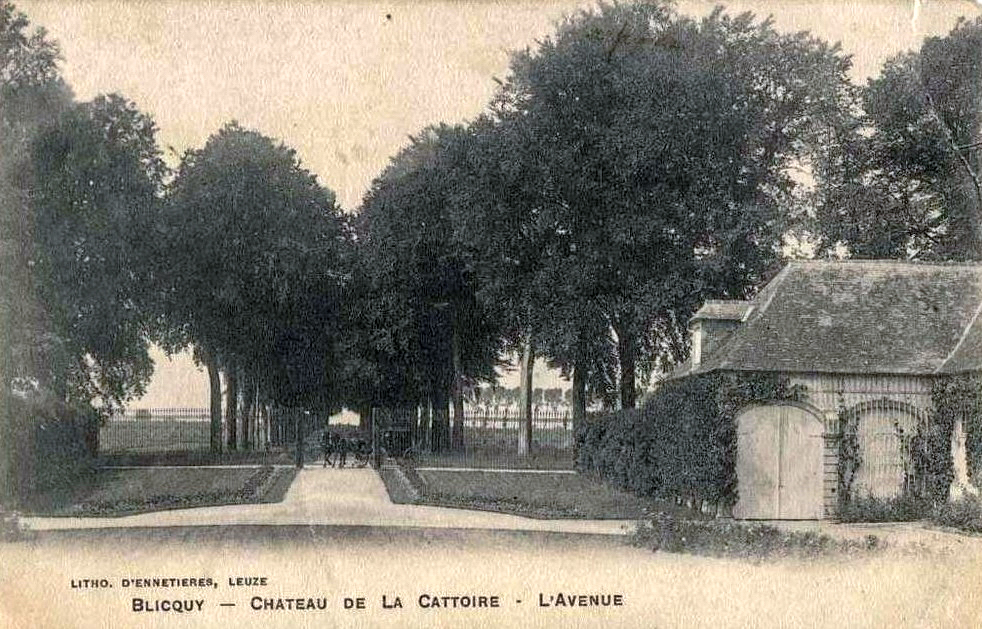 Château de la Cattoire (1703) Blicquy, section de la ville belge de Leuze-en-Hainaut, province de Hainaut. (Be)